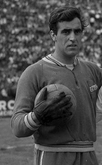 Estadio Centenario 1960